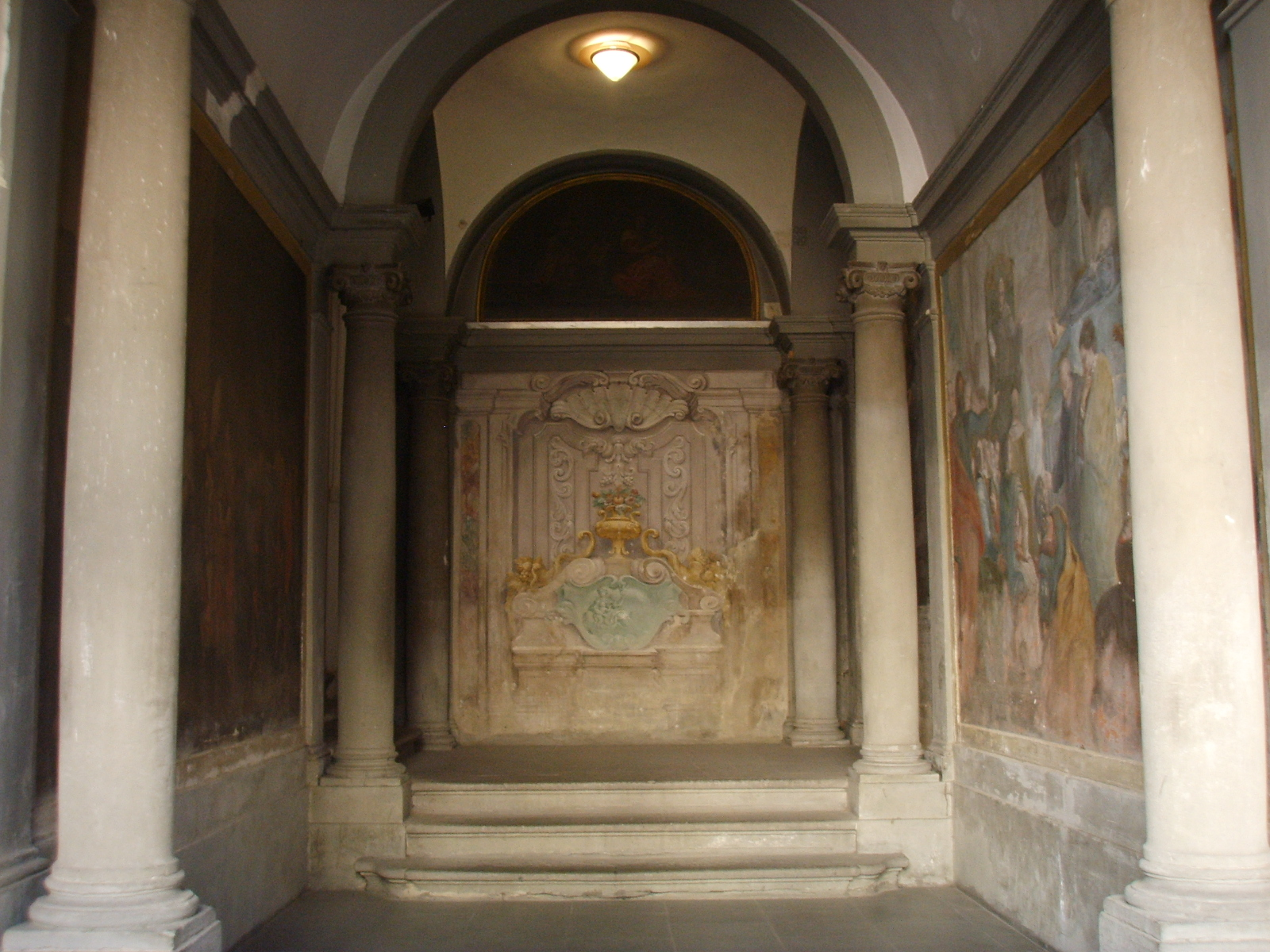 San Giovanni di Dio vano scale